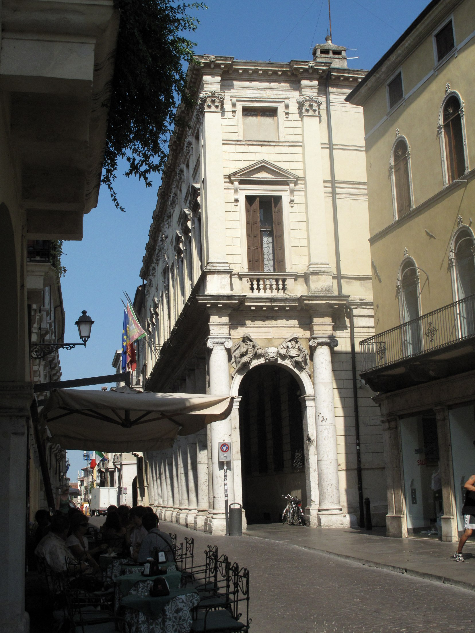 Vicenza 41